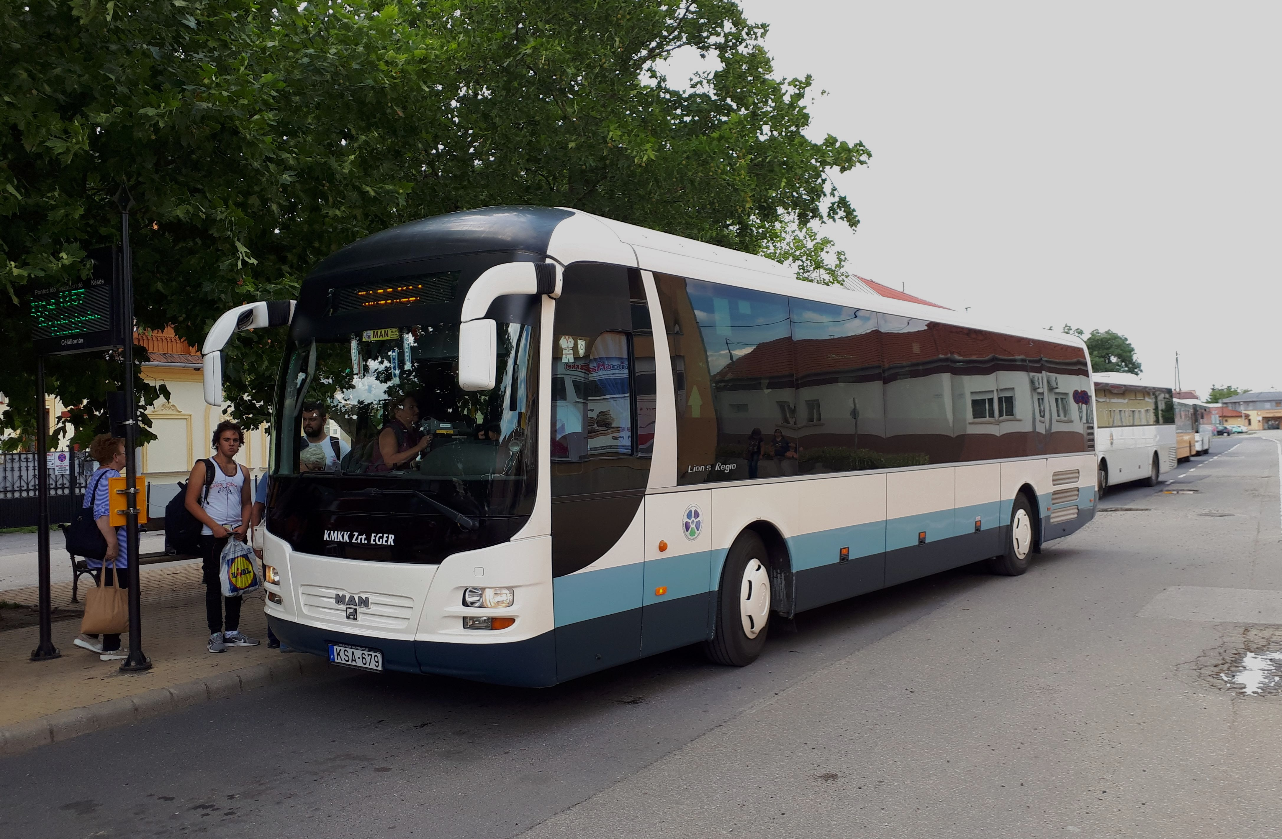 A KMKK KSA-679 rendszámú MAN Lion's Regio típusú busza Mezőkövesden, a 1380-as helyközi járaton.